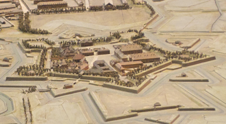 Plan-relief de la citadelle de Strasbourg en 1863. Plan-relief construit de 1830 à 1836 sous la direction de Boitard et actualisé de 1852 à 1863. Échelle 1/600e